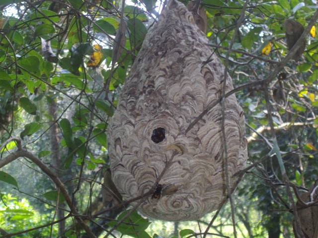 കടന്നല്‍ കൂട്